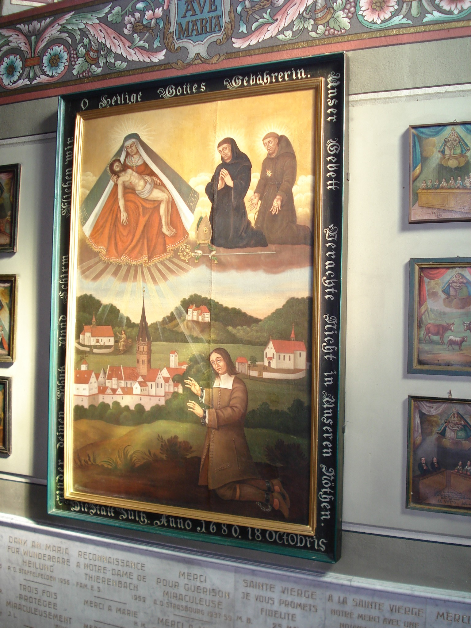 Thierenbach : L'ex-voto le plus ancien (1680) d'Ignace Ditterle